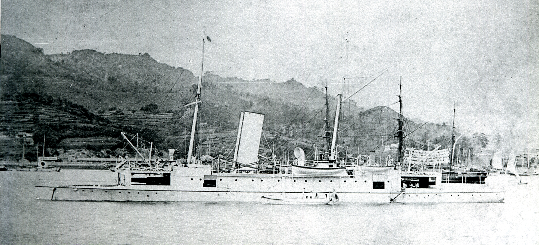 Japanese gunboat Tsukushi at Nagasaki